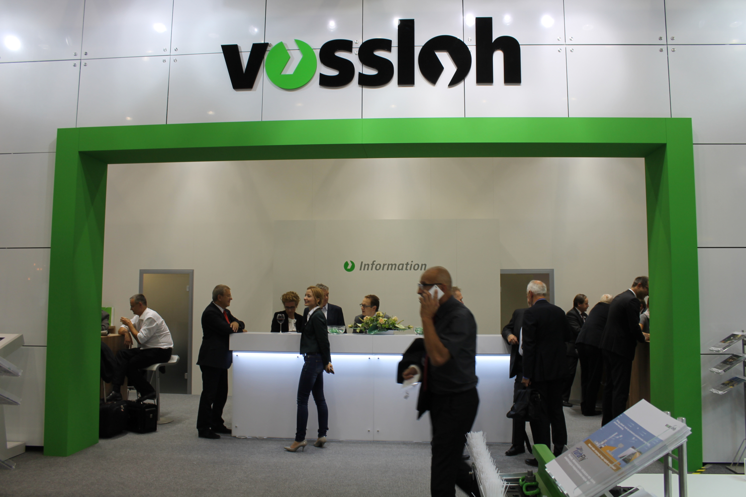 Stoisko Vossloha podczas targów Trako 2015. The making of this document was supported by Wikimedia Polska Association, within Wikigrant no. WG 2015-34. English | polski | +/−